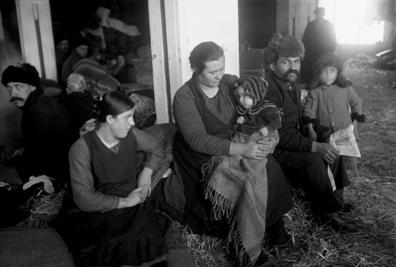 Die Flucht aus Russland! 10 tausend Deutsch-Russen befinden sich vor den Toren Moskaus, um aus Sowjet-Russland auszuwandern, da ihnen dort keine Existenzmöglichkeiten mehr gegeben sind. Davon sind bereits 400 Deutsch-Russen in Kiel eingetroffen und werden von der Stadt kostenlos bis zu ihrer Weiterreise nach Canada verpflegt und untergebracht. Die deutsch-russischen Bauern haben Land und Haus und die gesamte Habe zu Schleuderpreisen verkaufen müssen. Die deutsche Regierung plant eine Hilfsaktion, welche zwei Millionen Manrk kosten wird, um den Deutsch-Russen, die ohne jegliche Mittel mehr sind, die Auswanderung nach Canada zu erleichtern. Eine deutsch-russische Bauernfamilie mit dem Rest ihrer Habe in dem Getreide-Sylow der Stadt Kiel, wo sie bis zu ihrer Weiterreise nach Canada untergebracht und verpflegt werden.